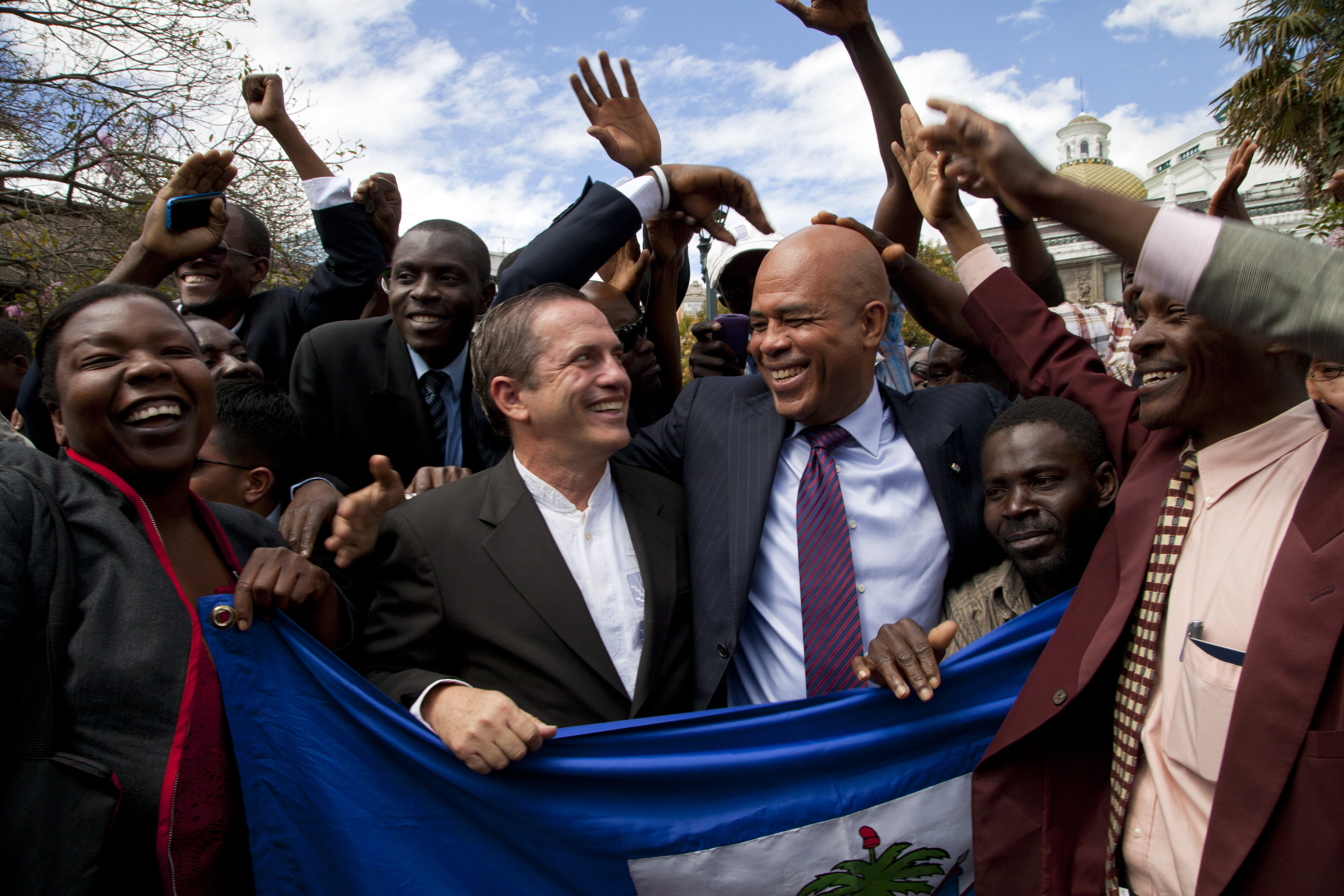 Quito (Ecuador), 11 de Julio 2012. Esta mañana, el Canciller Ricardo Patiño asistió a la Ceremonia de colocación de ofrenda floral en honor a los Héroes de la Independencia por parte del Presidente de Haití Michel Martelly. Posterior a la ceremonia se dirigieron a la Presidencia, donde los recibió el Presidente Rafael Correa. Foto: Fernanda LeMarie - Ministerio de Relaciones Exteriores, Comercio e Integración.